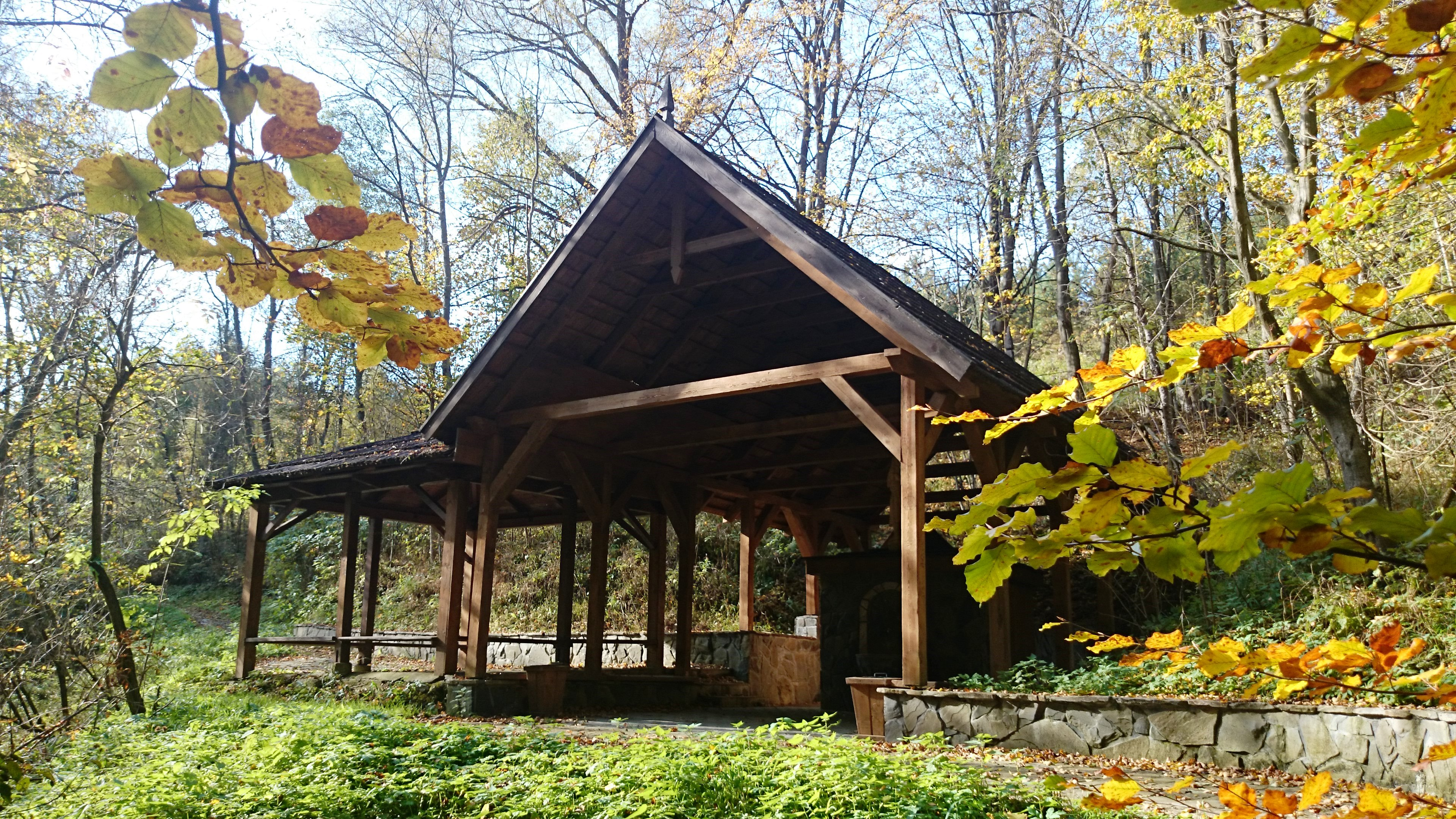 Pawilon źródła "Maria" na przedłużeniu ulicy Źródlanej w Krościenku nad Dunajcem